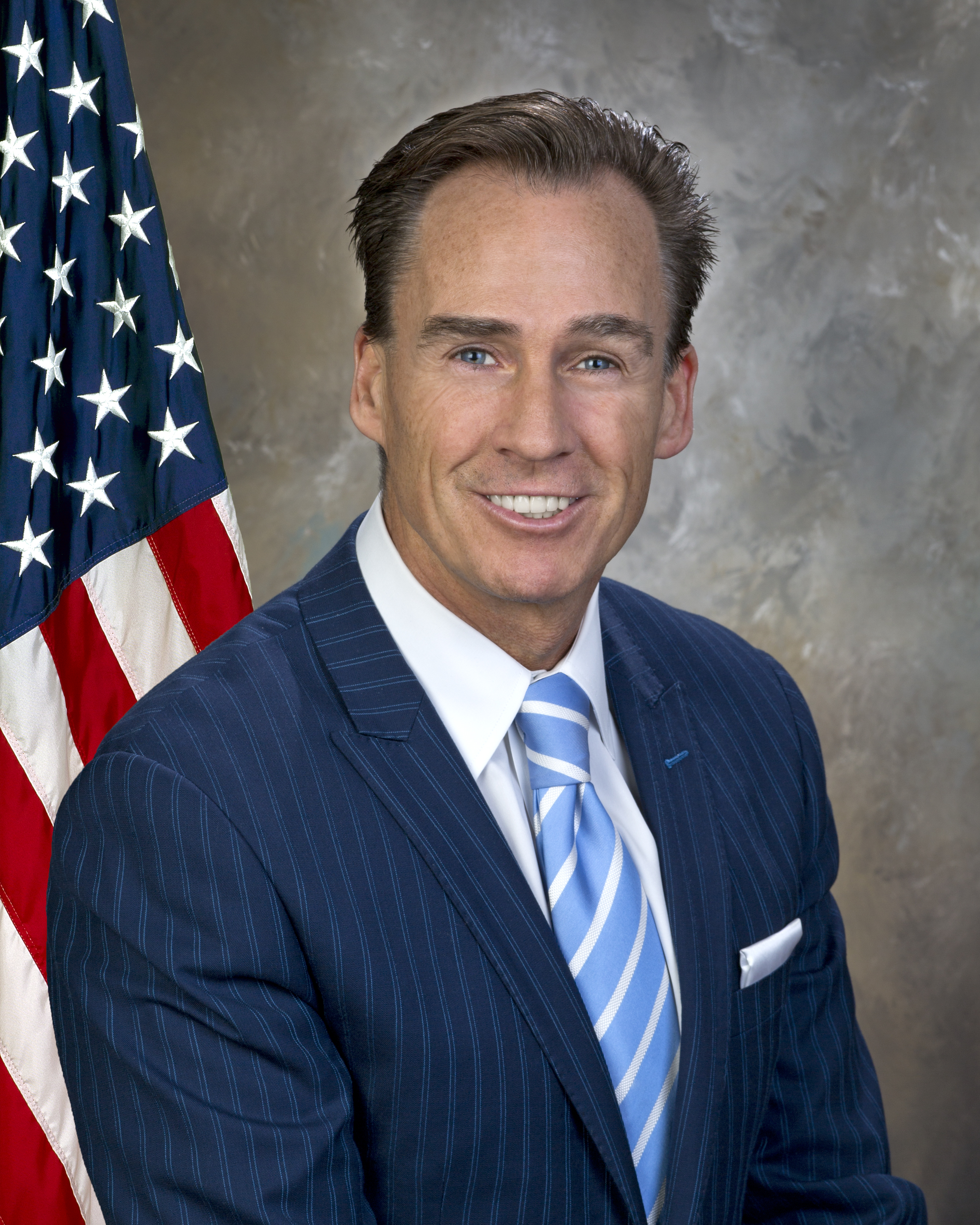 Liet. Gov. Michael Stack